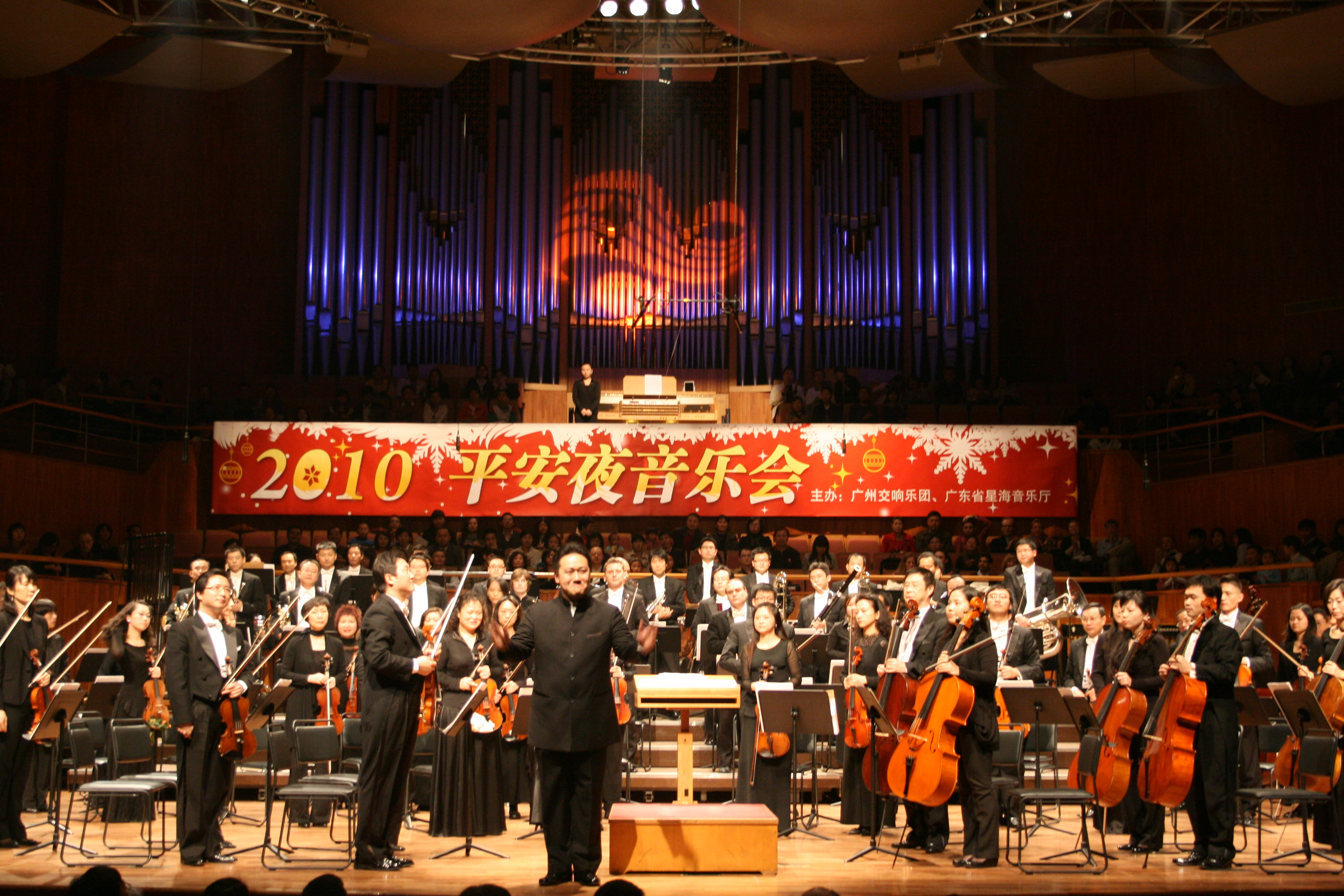 广州交响乐团在演出当中。